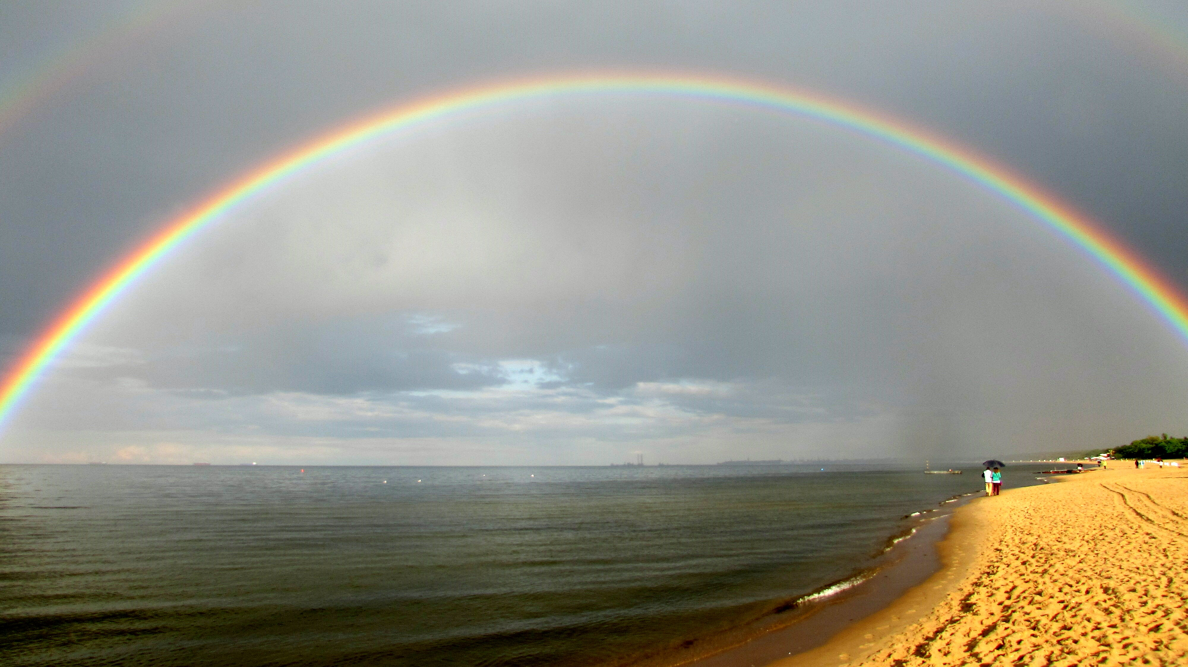 Sopot Regenbogen 2015-2